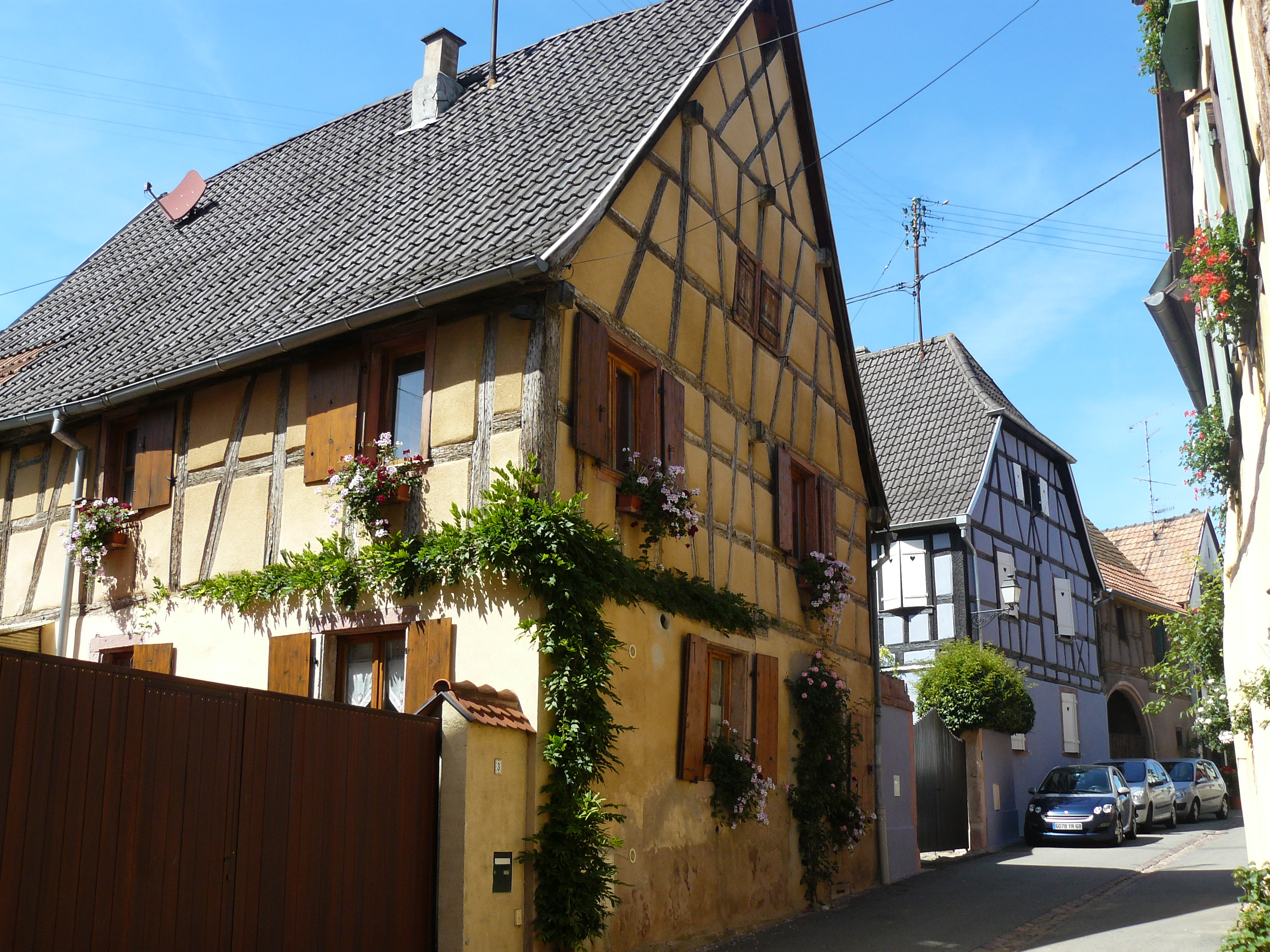 Maisons à colombages